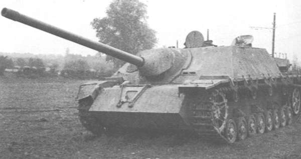 Een Jagdpanzer IV met het dodelijke L/70 kanon